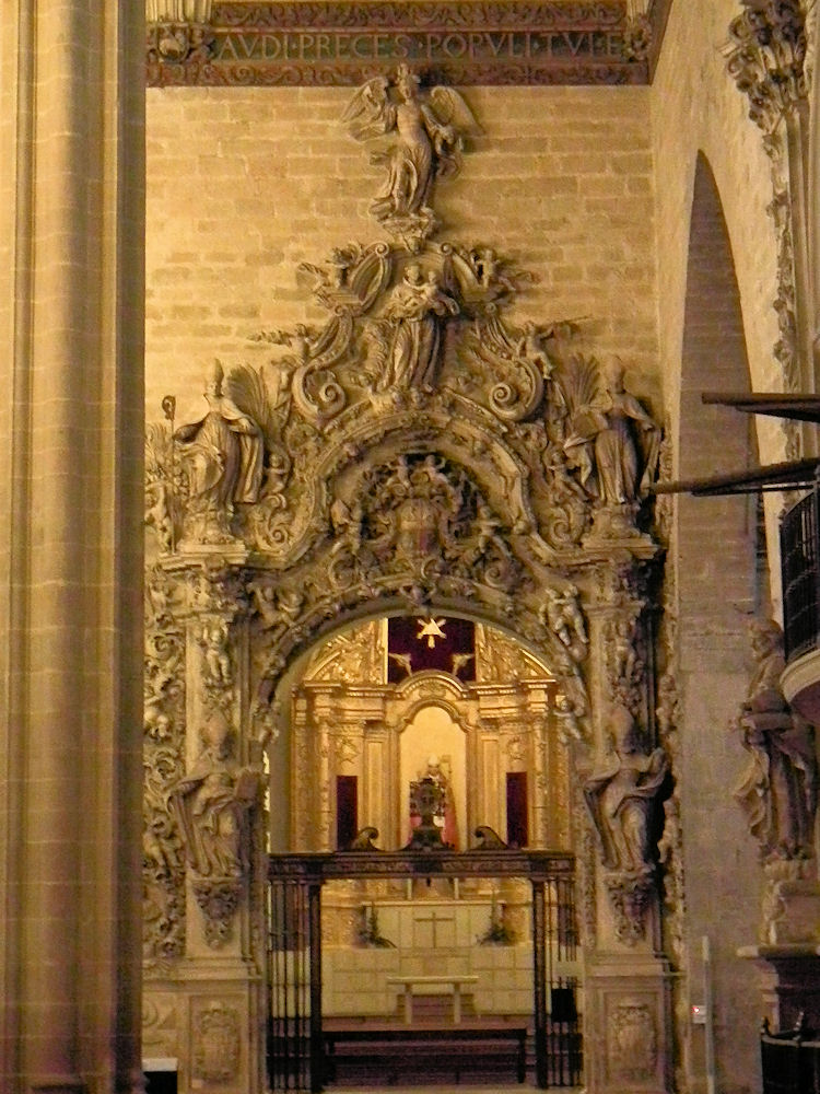 Baroque portal into "Capilla de San Carlos Borromeo" -- Catedral de Santa María de la Asunción, Barbastro, Huesca, Spain